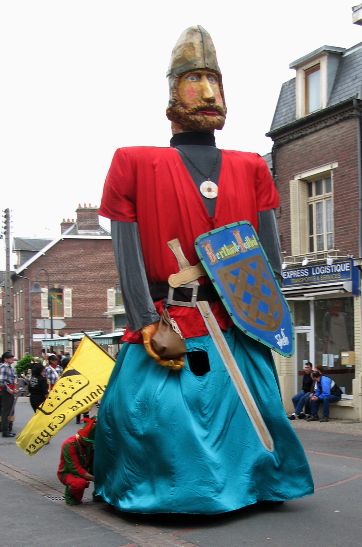 Ham (Somme, France) - Animation festive au centre-ville, un dimanche de printemps. Le géant Berthoult. .